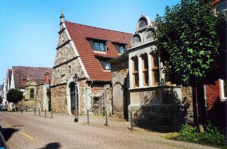 Münchhausen-Hof in Rinteln, erbaut von Hilmar von Münchhausen, Mitte 16. Jhd.